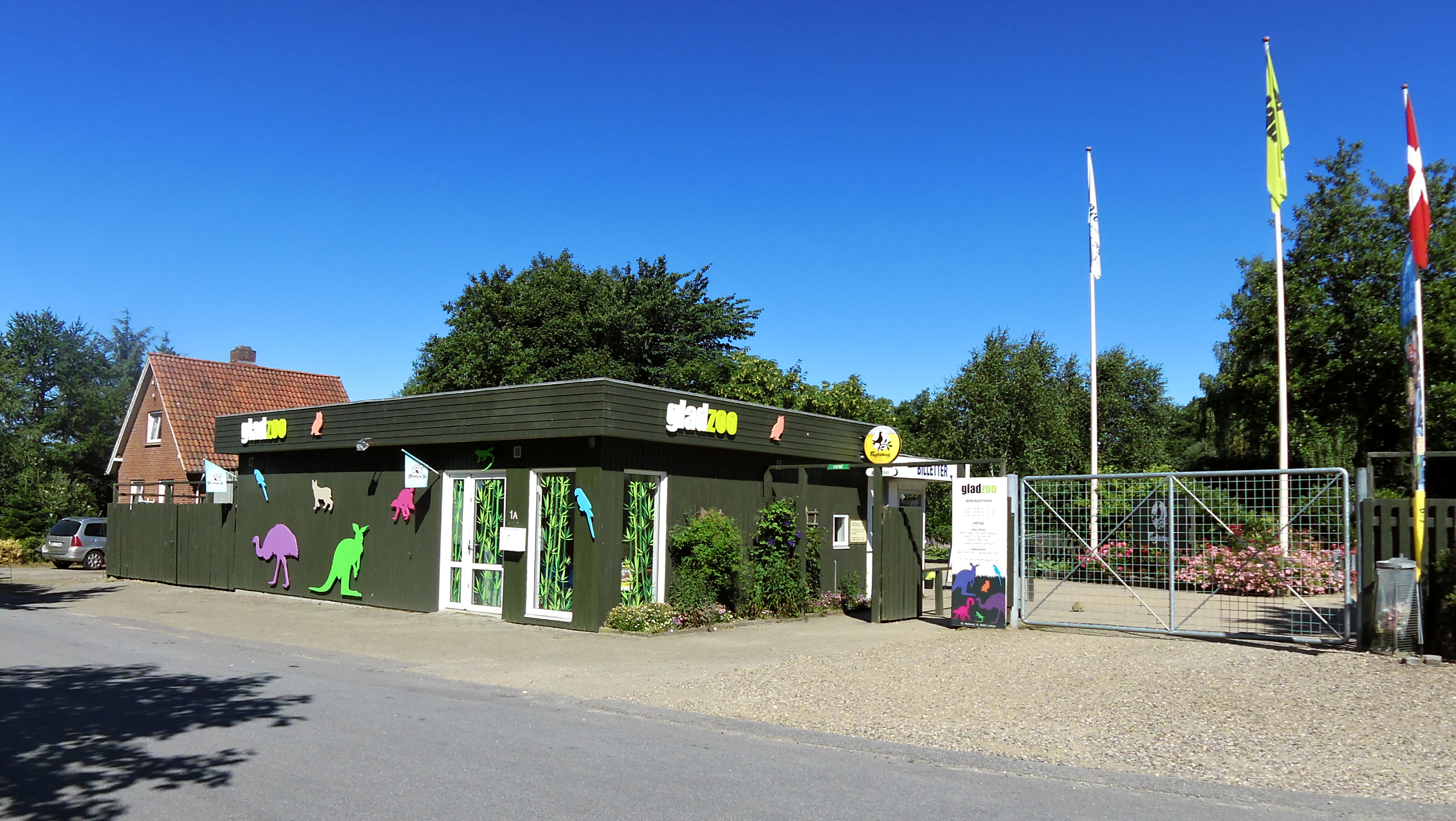 Gladzoo